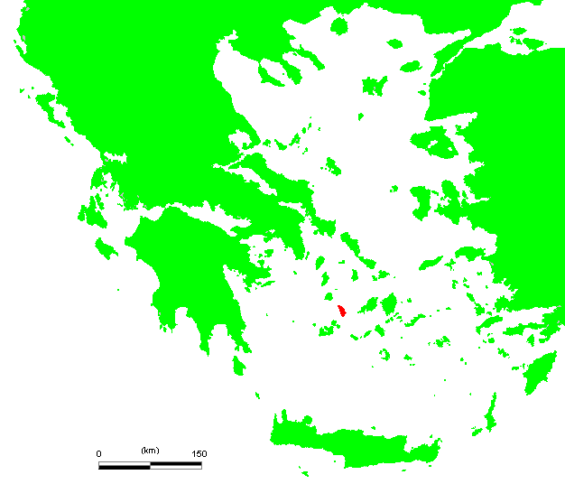 GR Sifnos.PNG (Greek island)